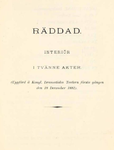 Räddad